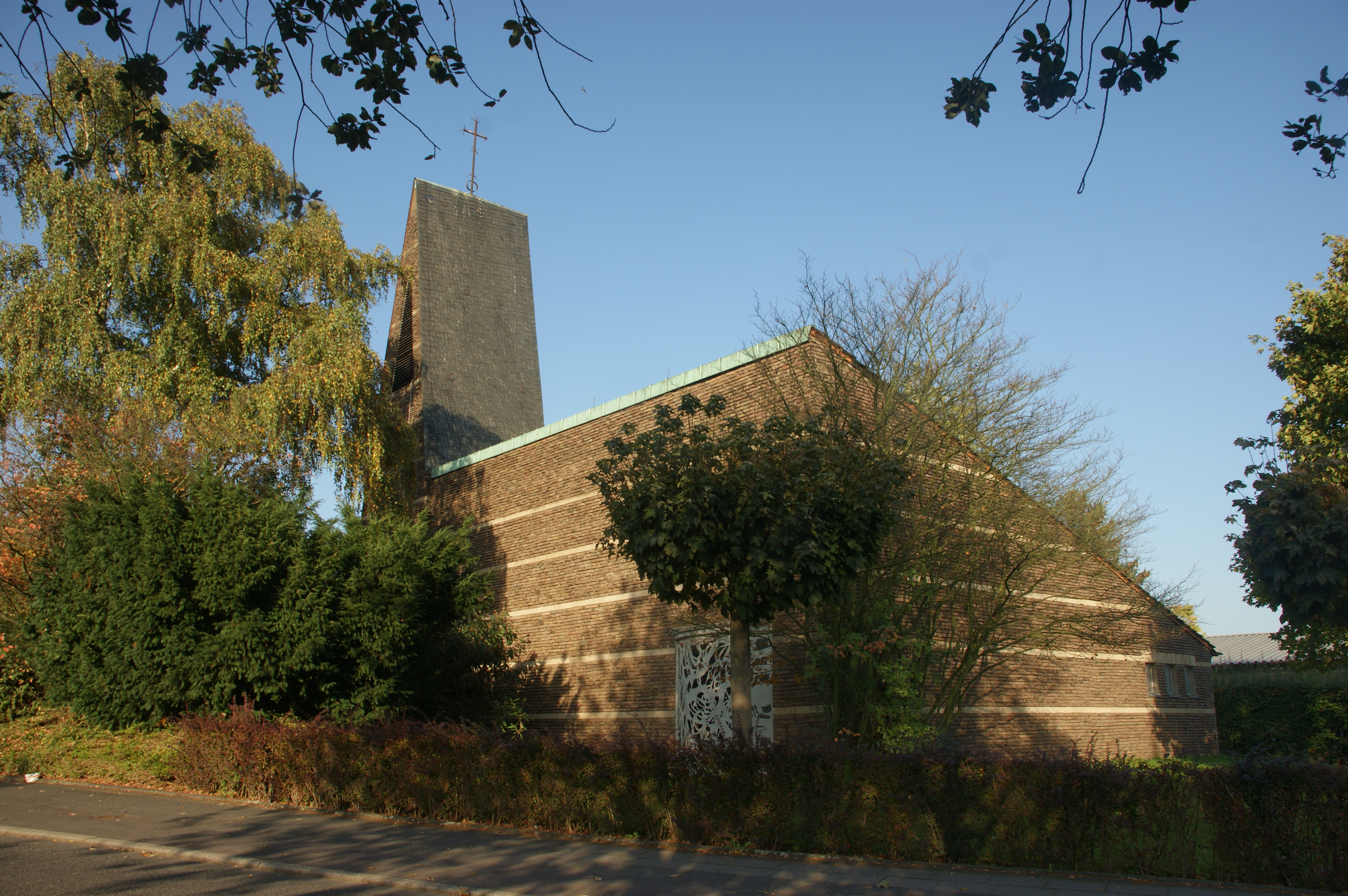 Die vom Architekten Siegfried Knoch 1960 erbaute Evangelische Christuskirche in Königsdorf